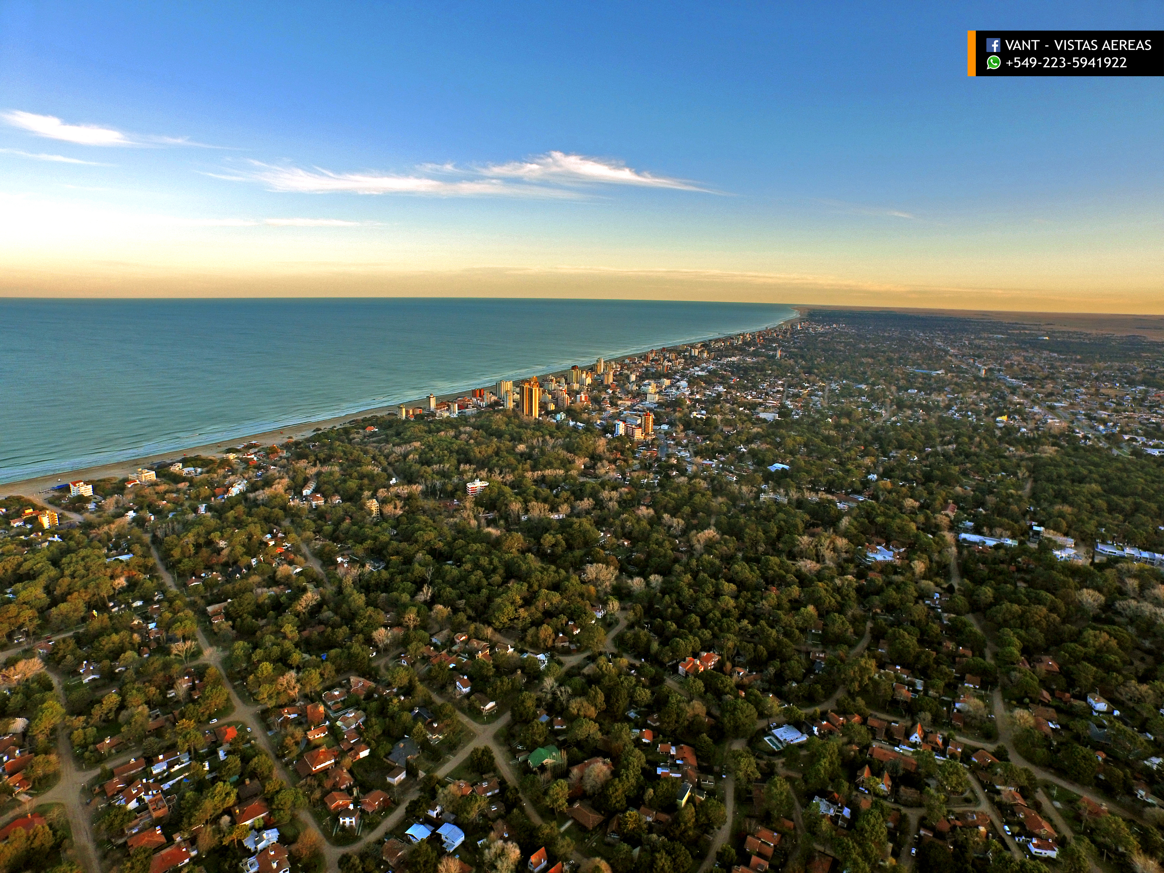 Villa Gesell, Argentina